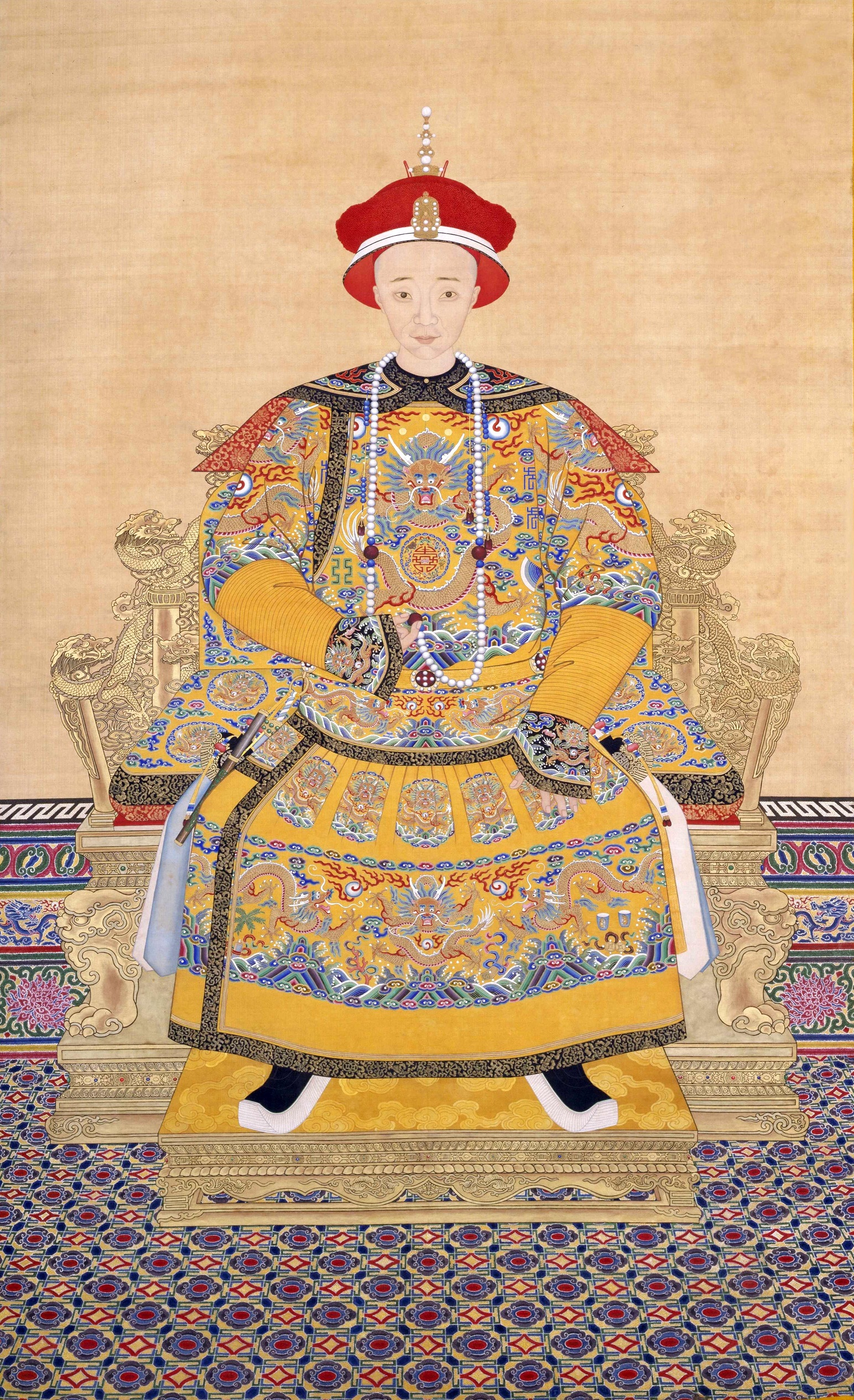 中文（中国大陆）: 咸丰皇帝朝服像